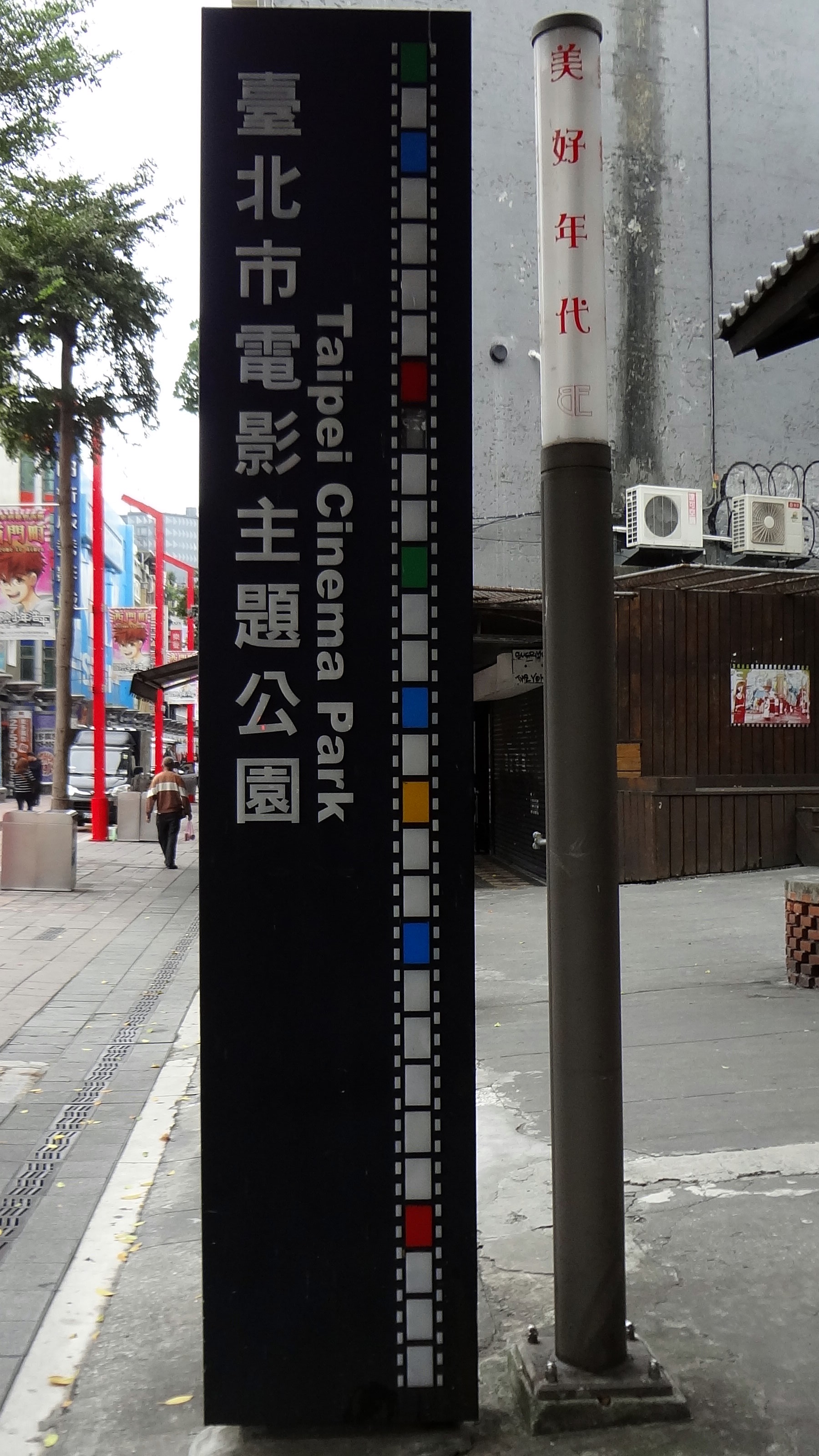 臺北市電影主題公園標誌燈箱。